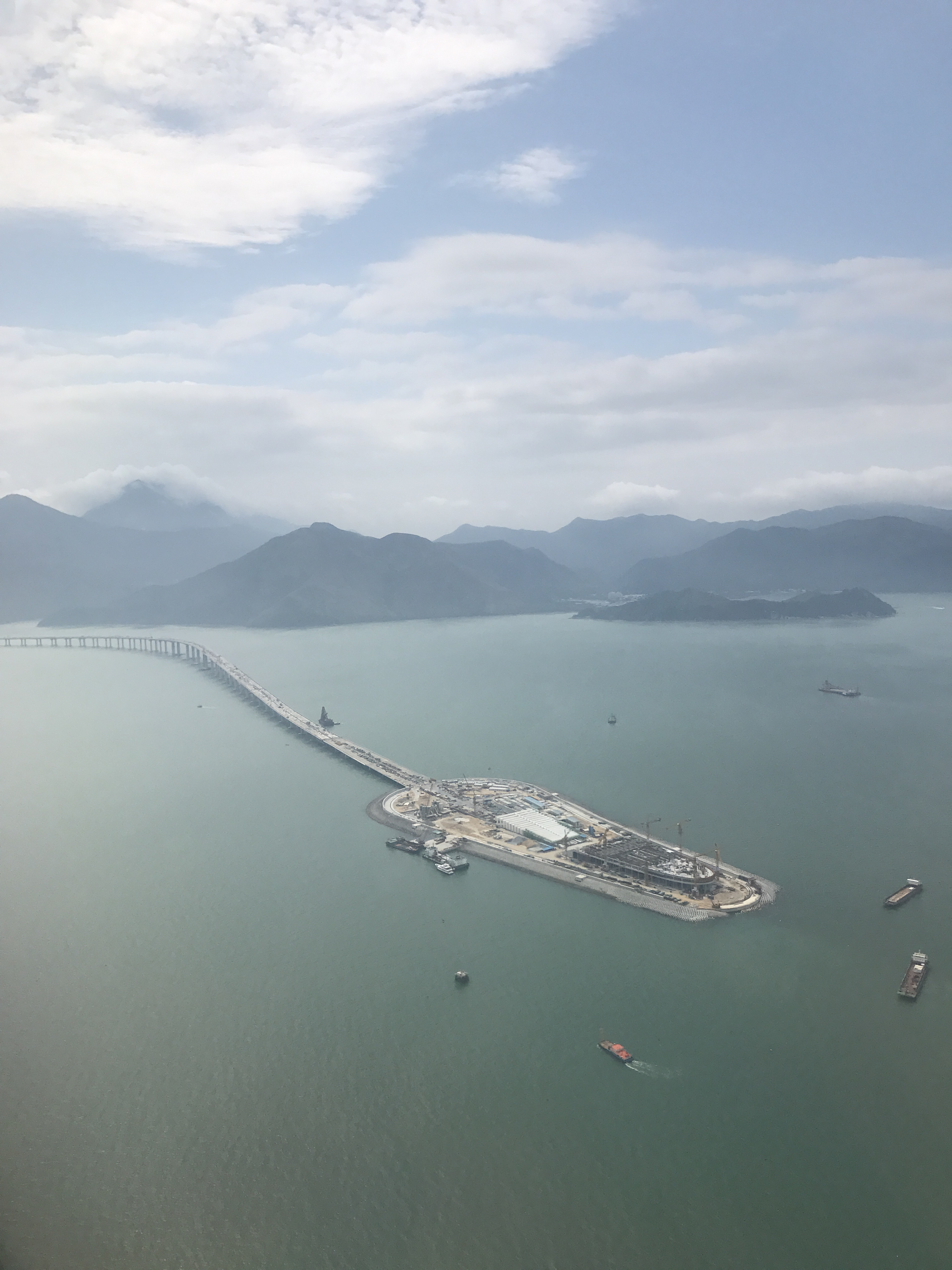 中文（中国大陆）: 兴建中的的海底隧道人工岛，于2017年5月8日10点03分57秒，TR2062航班。